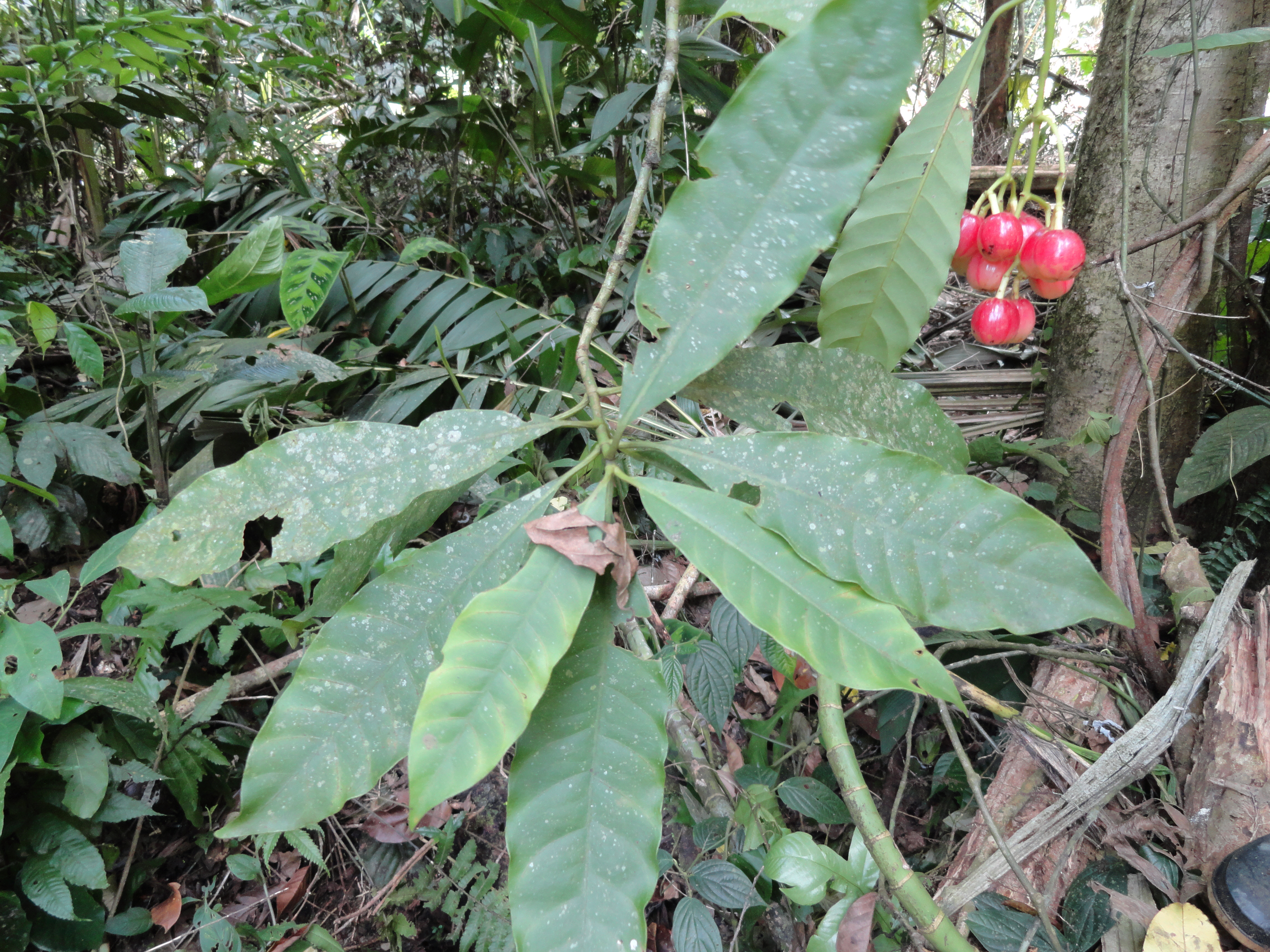 Chrysochlamys nicaraguensis en Reserva Indígena Cabecar de Bajo Chirripó, Turrialba, Costa Rica